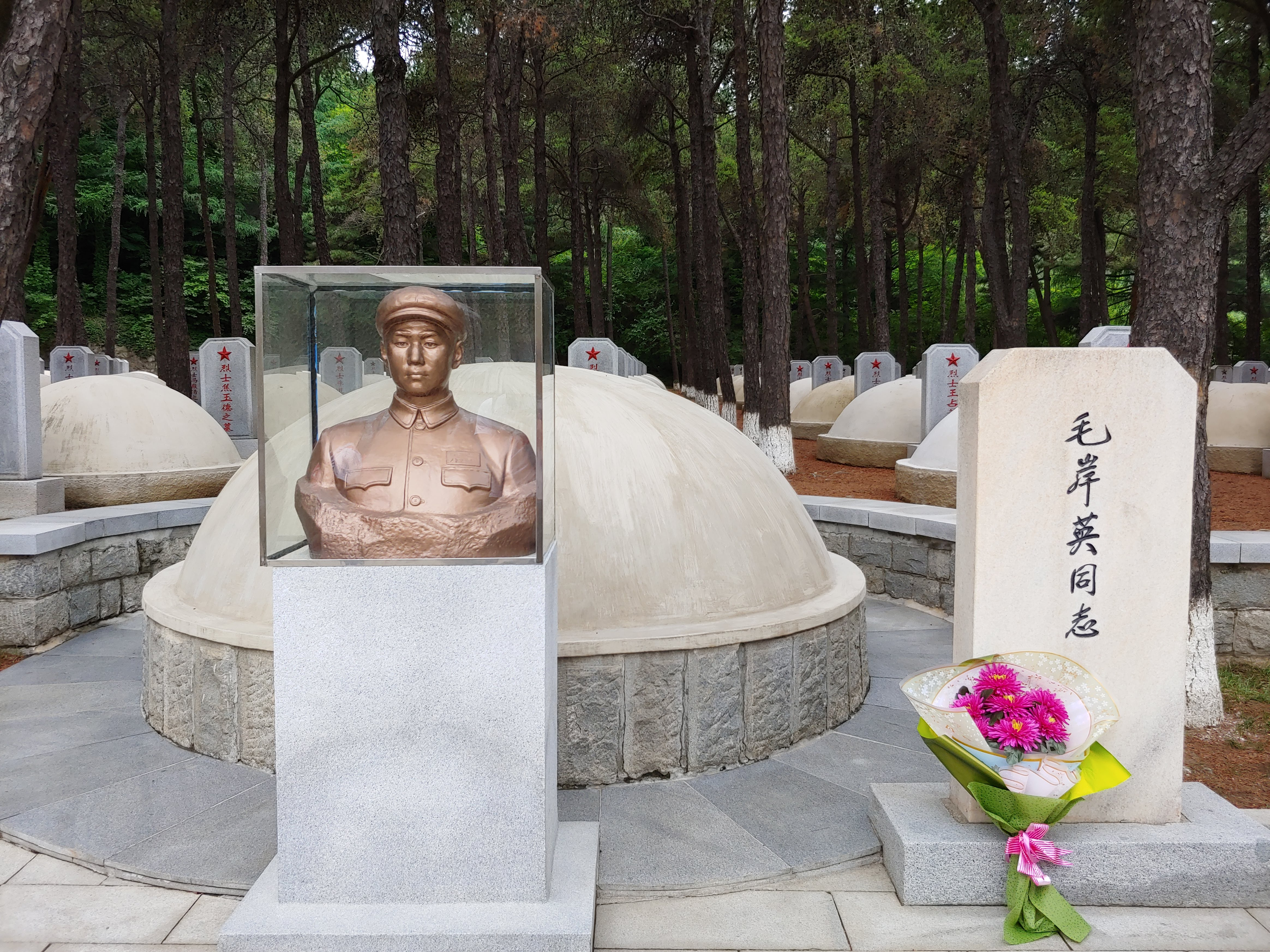 Sépulture de Mao Anying en Corée du Nord